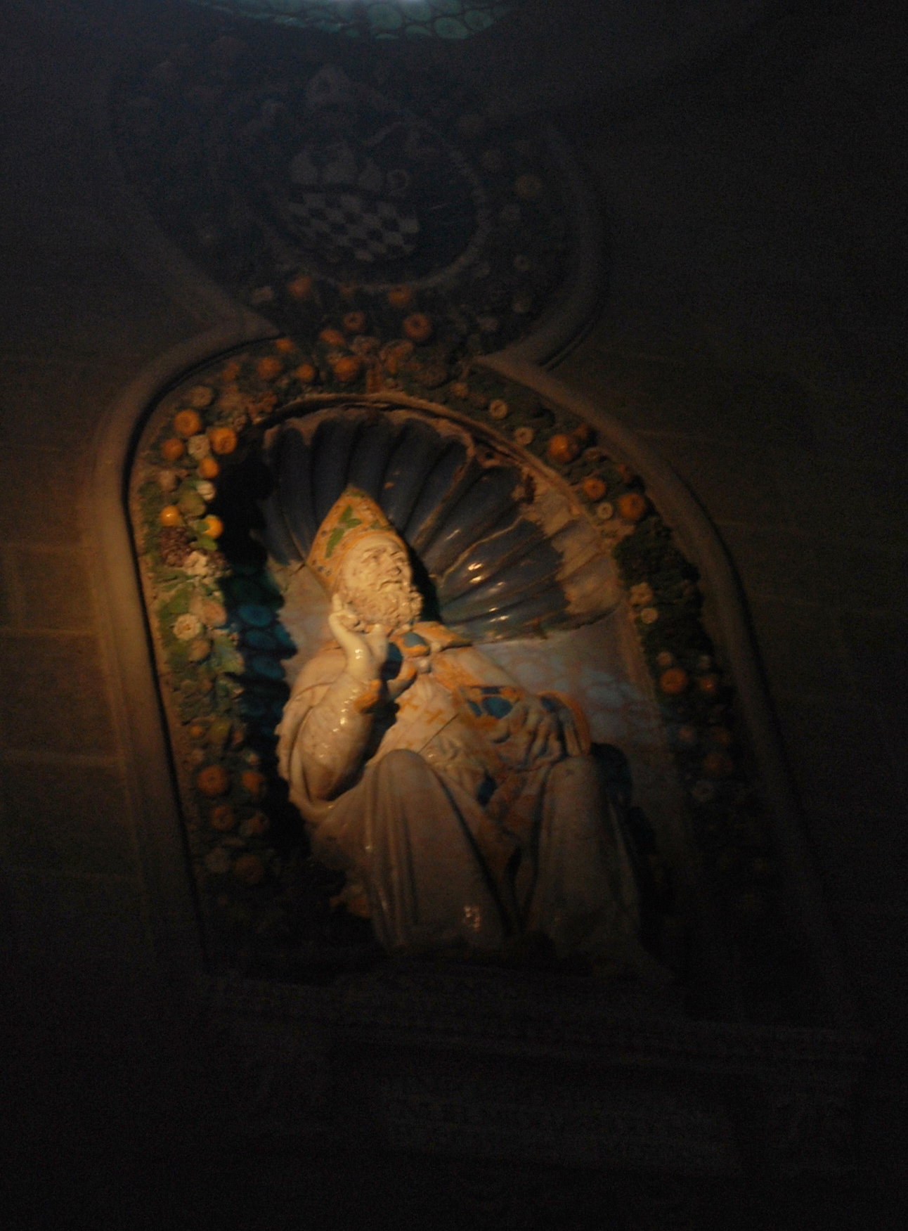 Duomo di fiesole, giovanni della robbia, san romolo